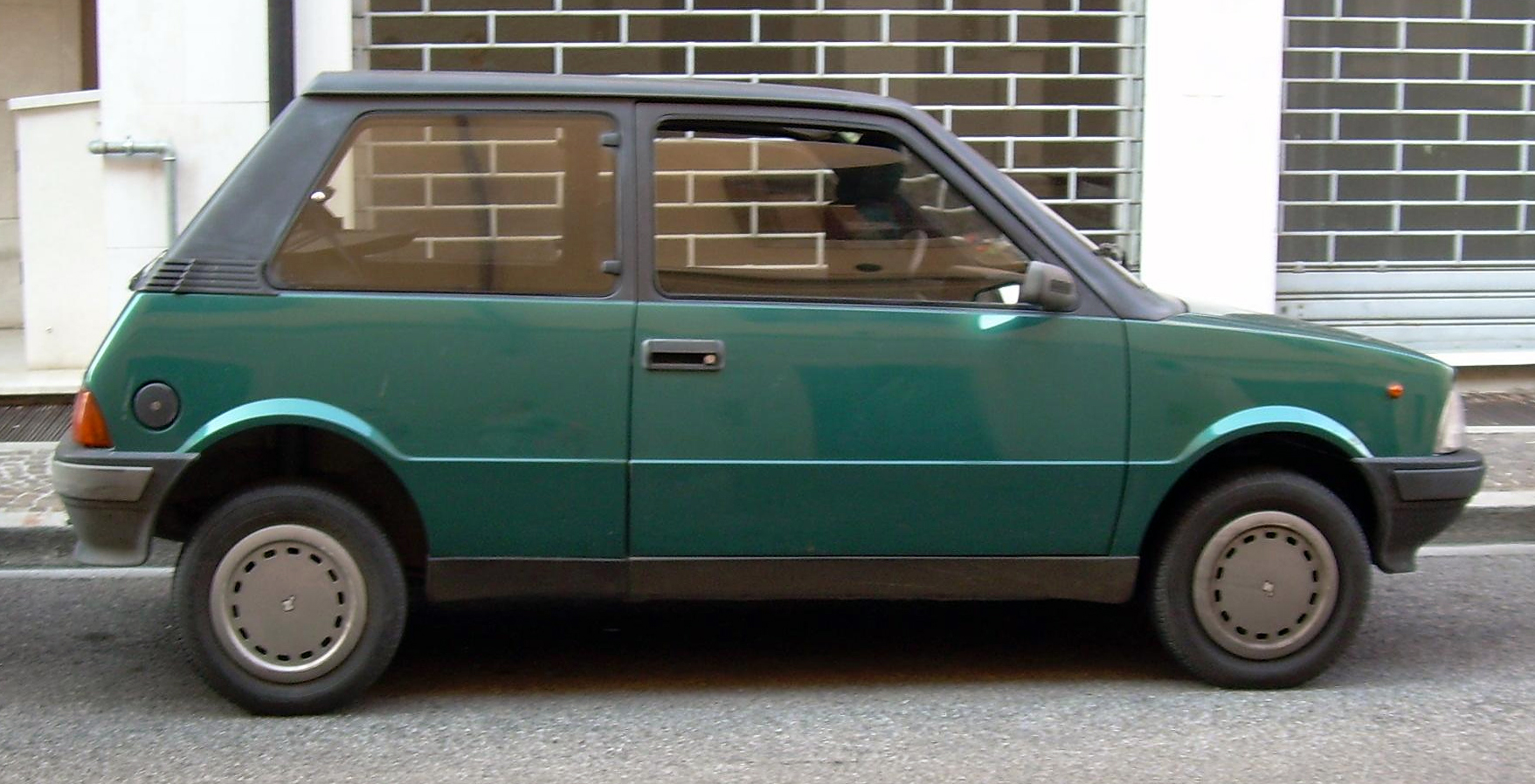 Autore:Powering Licenza: Una Innocenti Small